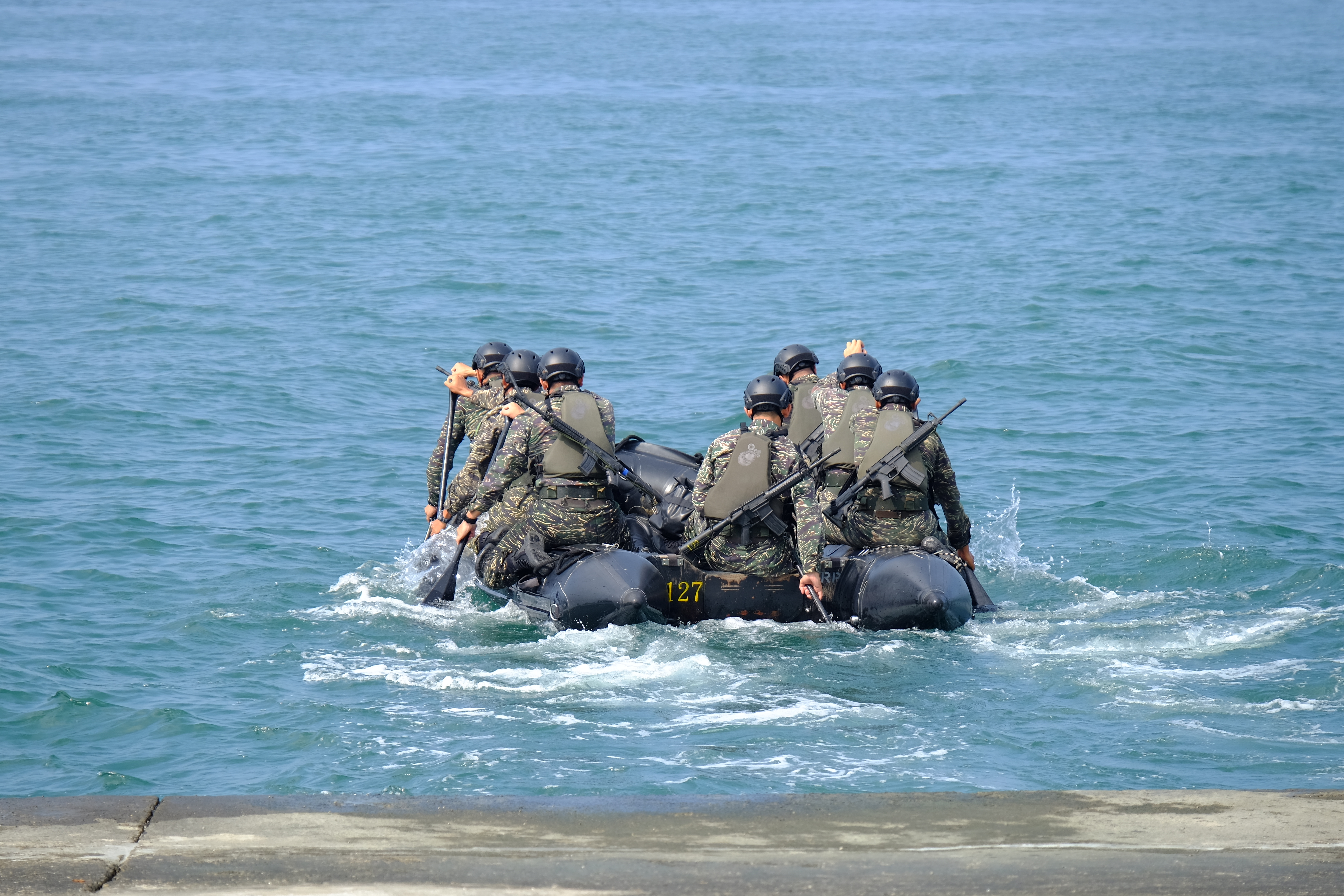 2015年左營軍港營區開放活動上午，海軍陸戰隊隊員划橡皮艇，航向操演水域。